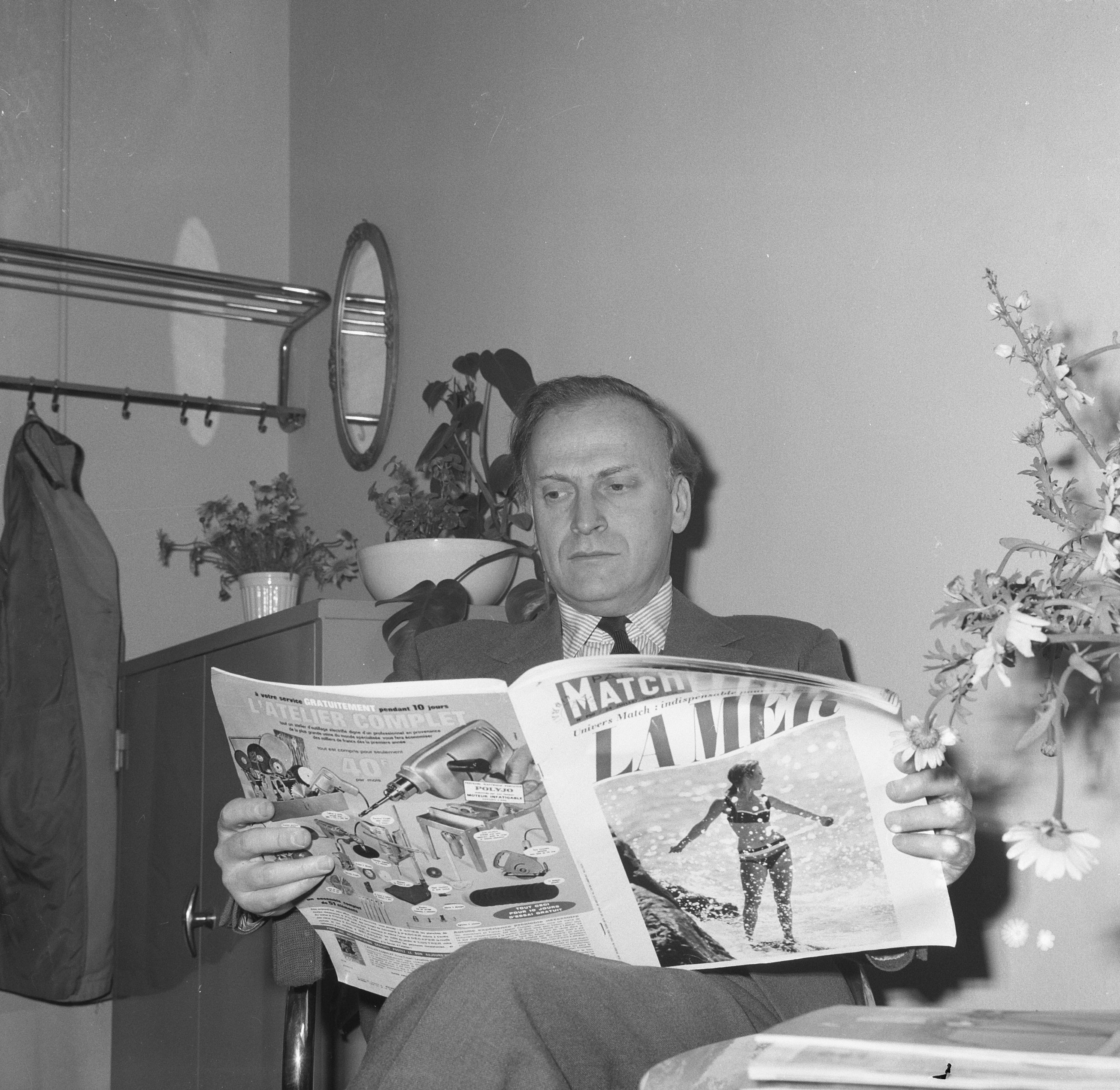 Collectie / Archief : Fotocollectie Anefo Reportage / Serie : [ onbekend ] Beschrijving : Aankomst Jehudi Menukin op Schiphol Datum : 29 juli 1965 Locatie : Noord-Holland, Schiphol Trefwoorden : aankomsten Fotograaf : Nijs, Jac. de / Anefo Auteursrechthebbende : Nationaal Archief Materiaalsoort : Negatief (zwart/wit) Nummer archiefinventaris : bekijk toegang 2.24.01.03 Bestanddeelnummer : 918-0217